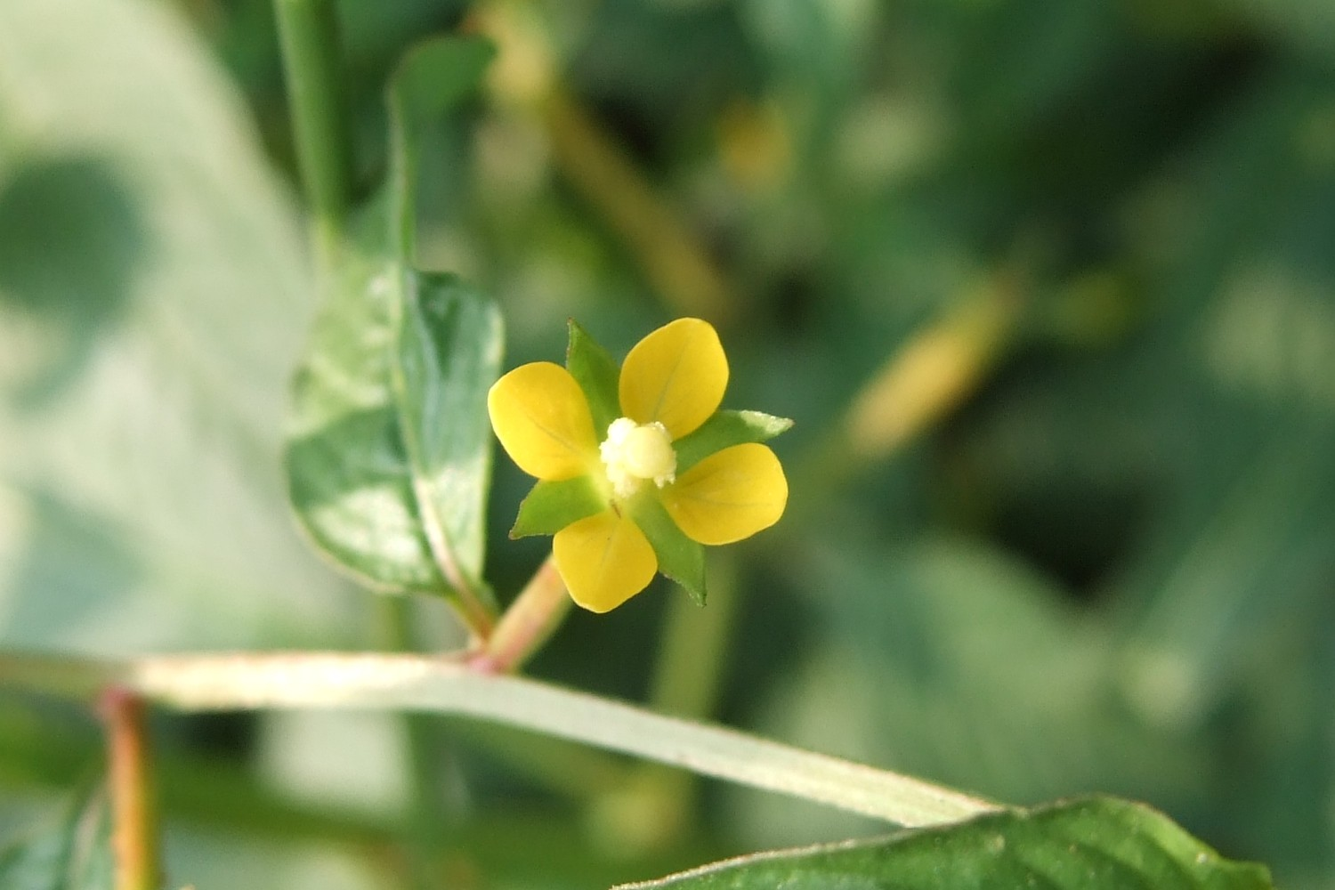 Ludwigia hyssopifolia; Sè-hio̍h chúi-teng-hiang; 細葉水丁香